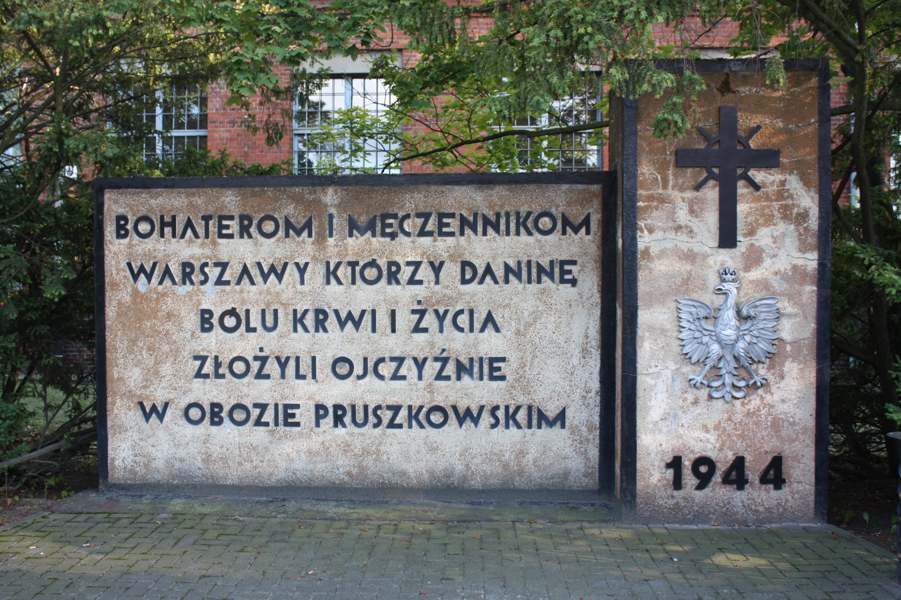 Pomnik w Zakładach Naprawczych Taboru Kolejowego w Pruszkowie